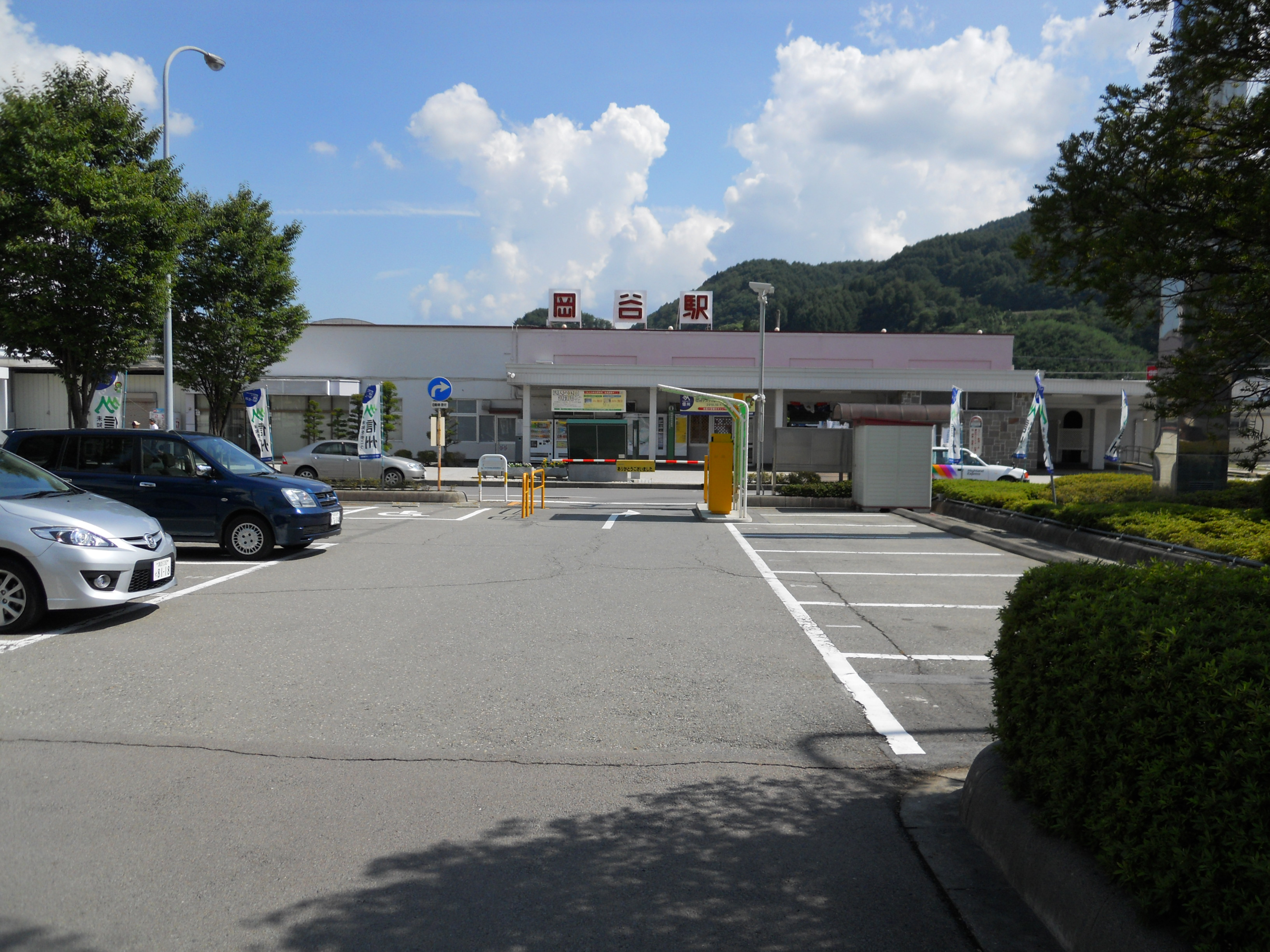 JR中央線岡谷駅